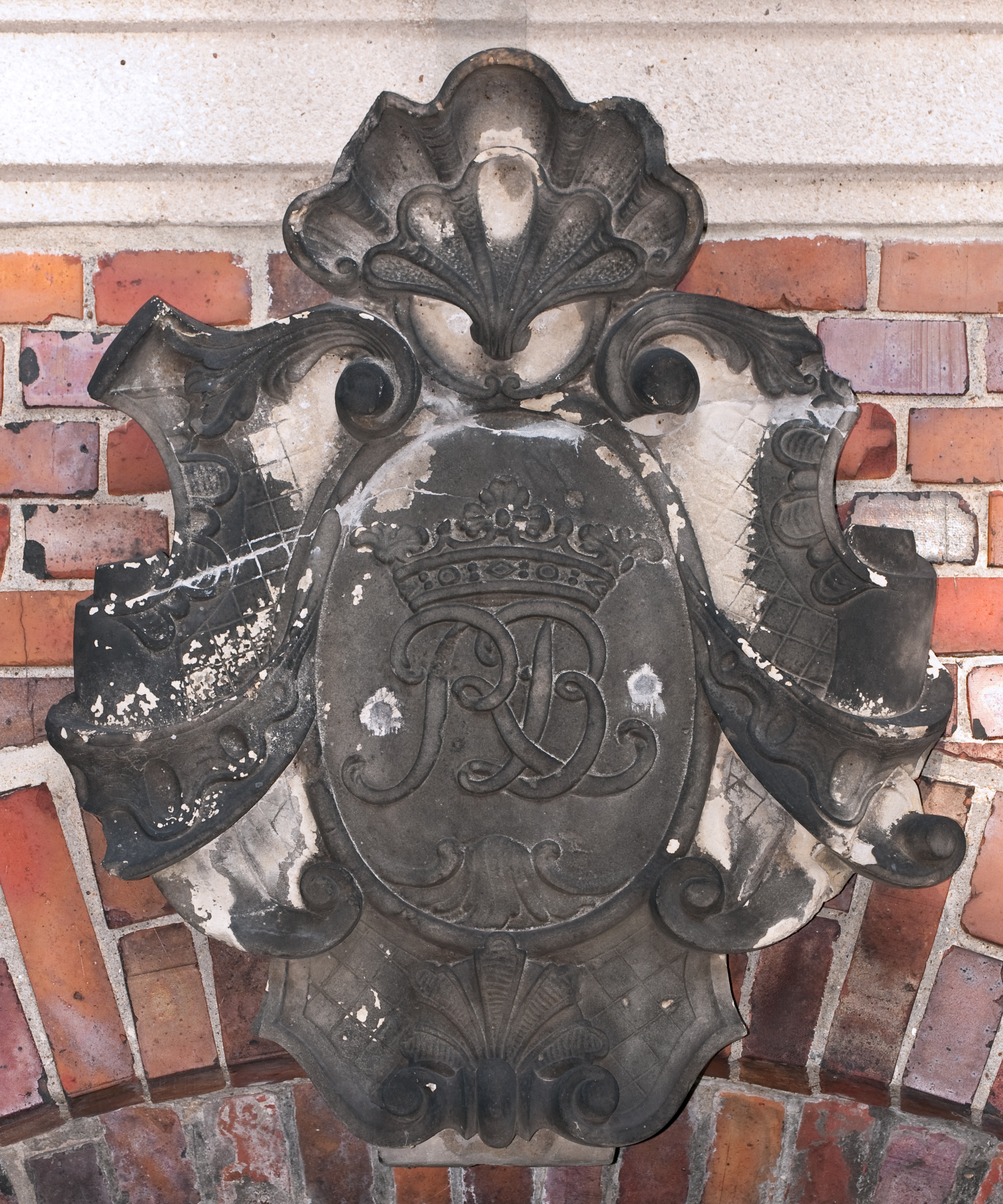 Kartusche mit Buchstaben "RB" Standort: Wallanlagen nördlich des Museums für Hamburgische Geschichte; Rückseite des Portals Große Reichenstraße 49 Herkunft: Große Reichenstraße 37, Hamburg; über dem Portal